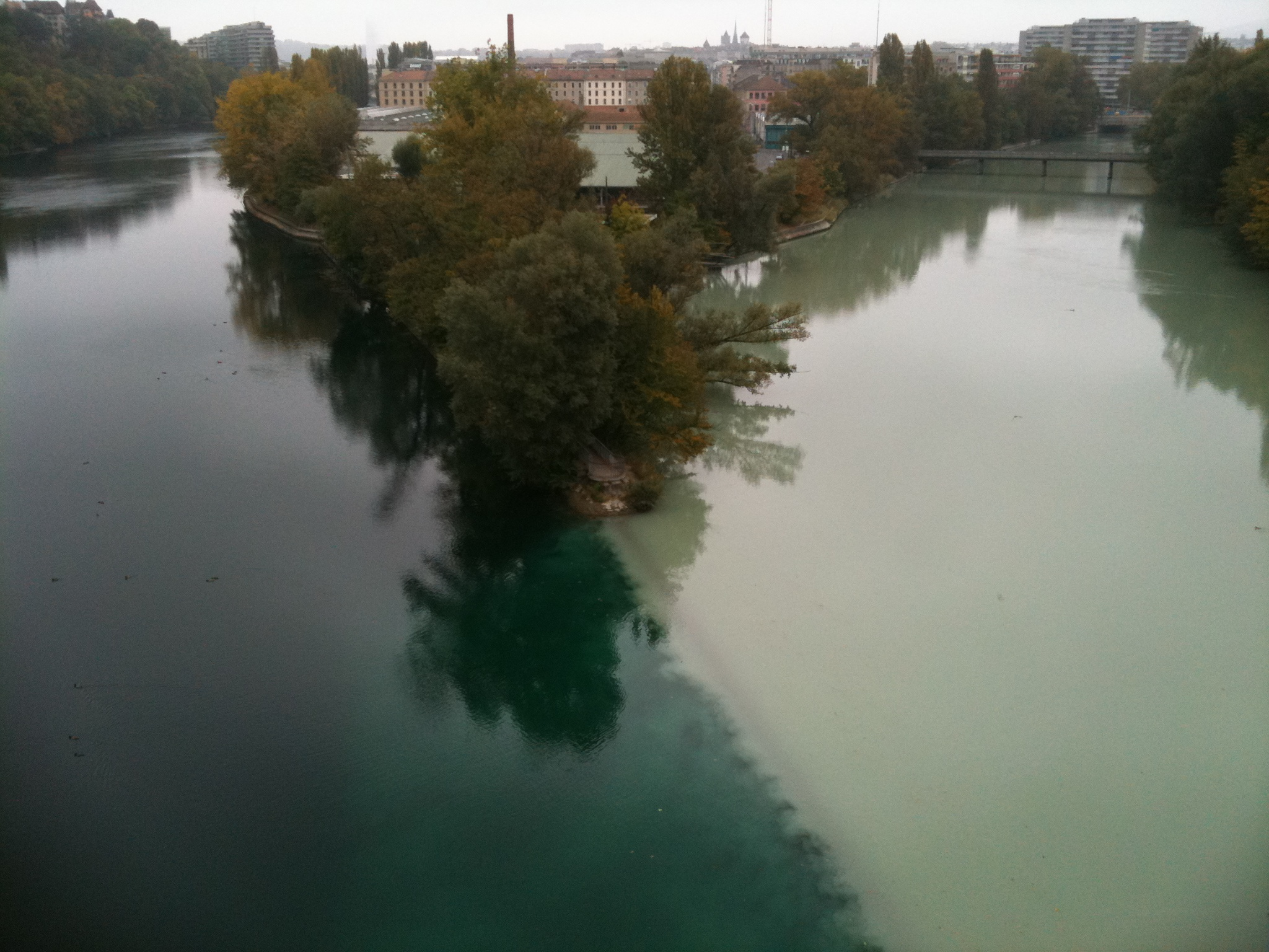 La Pointe de la Jonction - L'Arve à droite se jette dans le Rhône à gauche de l'image - Genève